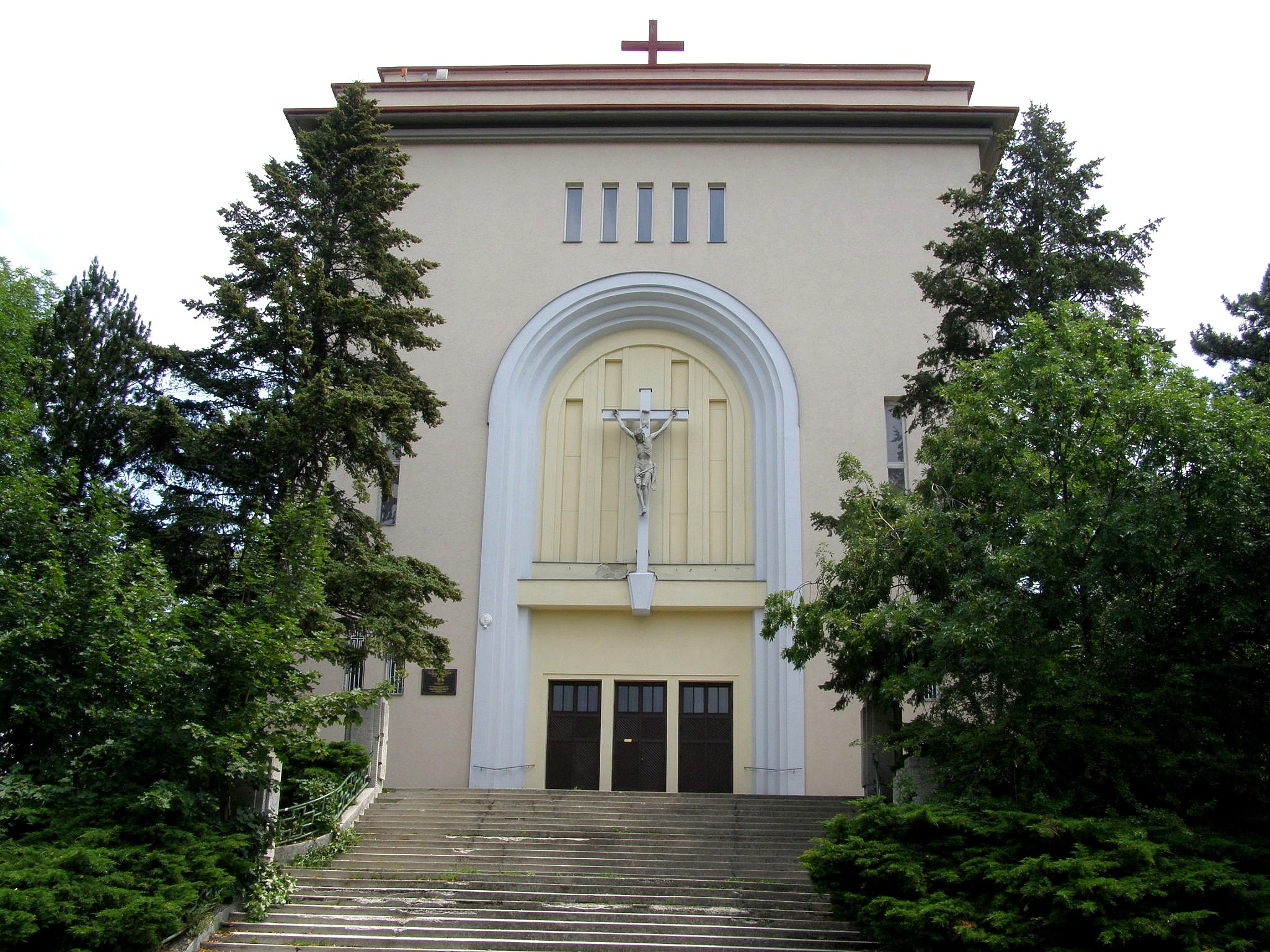 Priečelie kostola